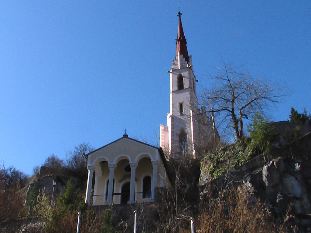 Wallfahrtskirche Locherboden bei Mötz in Tirol. 14. Mai 2006 Panasonic NV GS150.